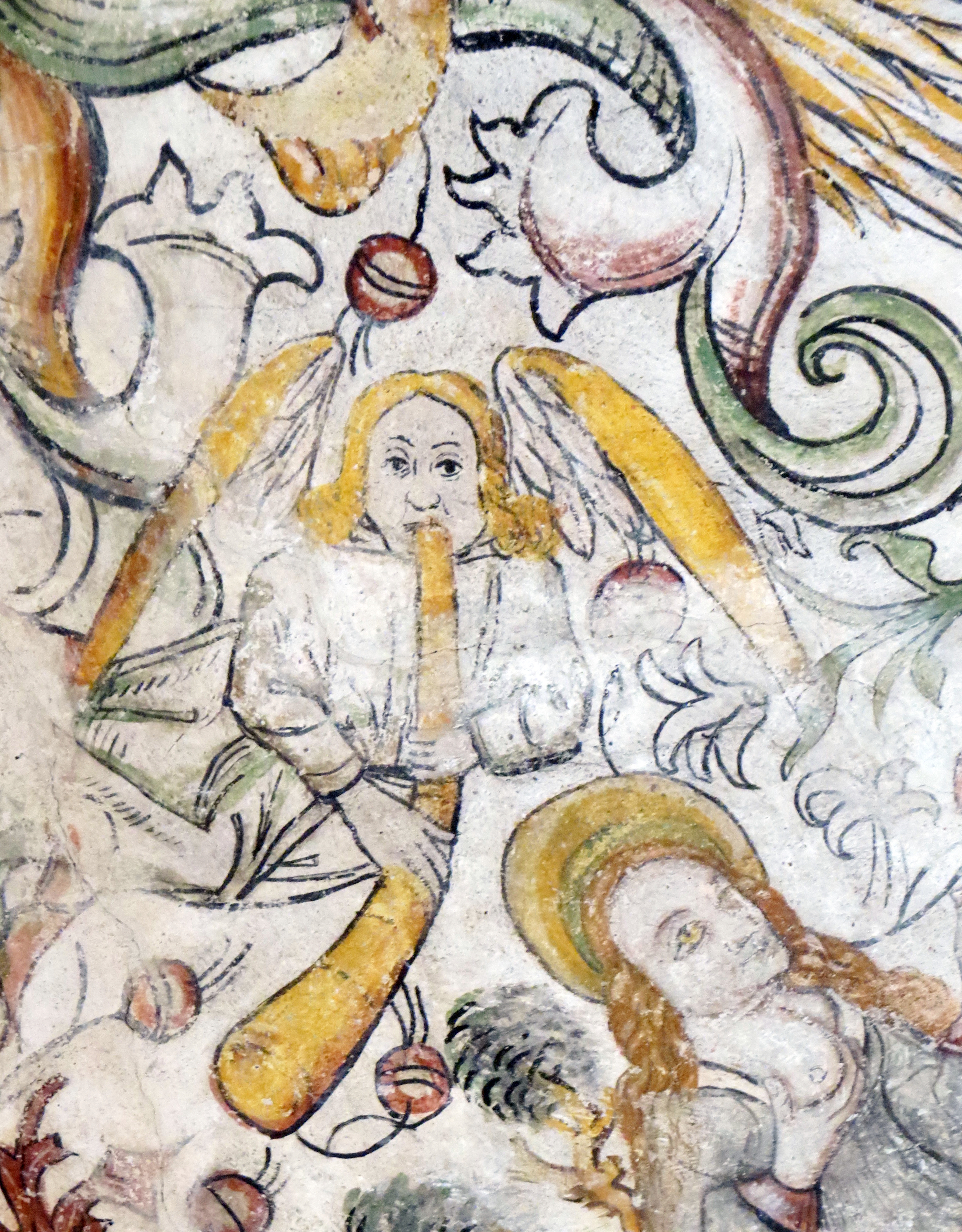 Kalkmaleri i Kræmmerkapellet, St. Petri Kirke, Malmø